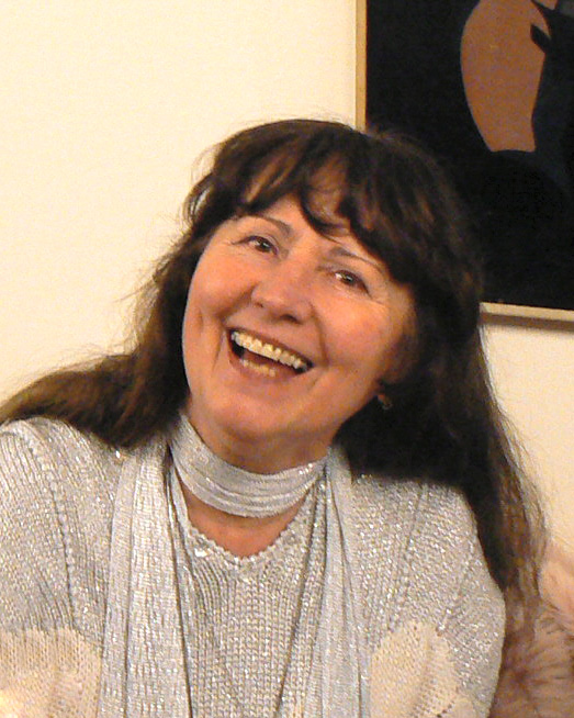 Fotografie